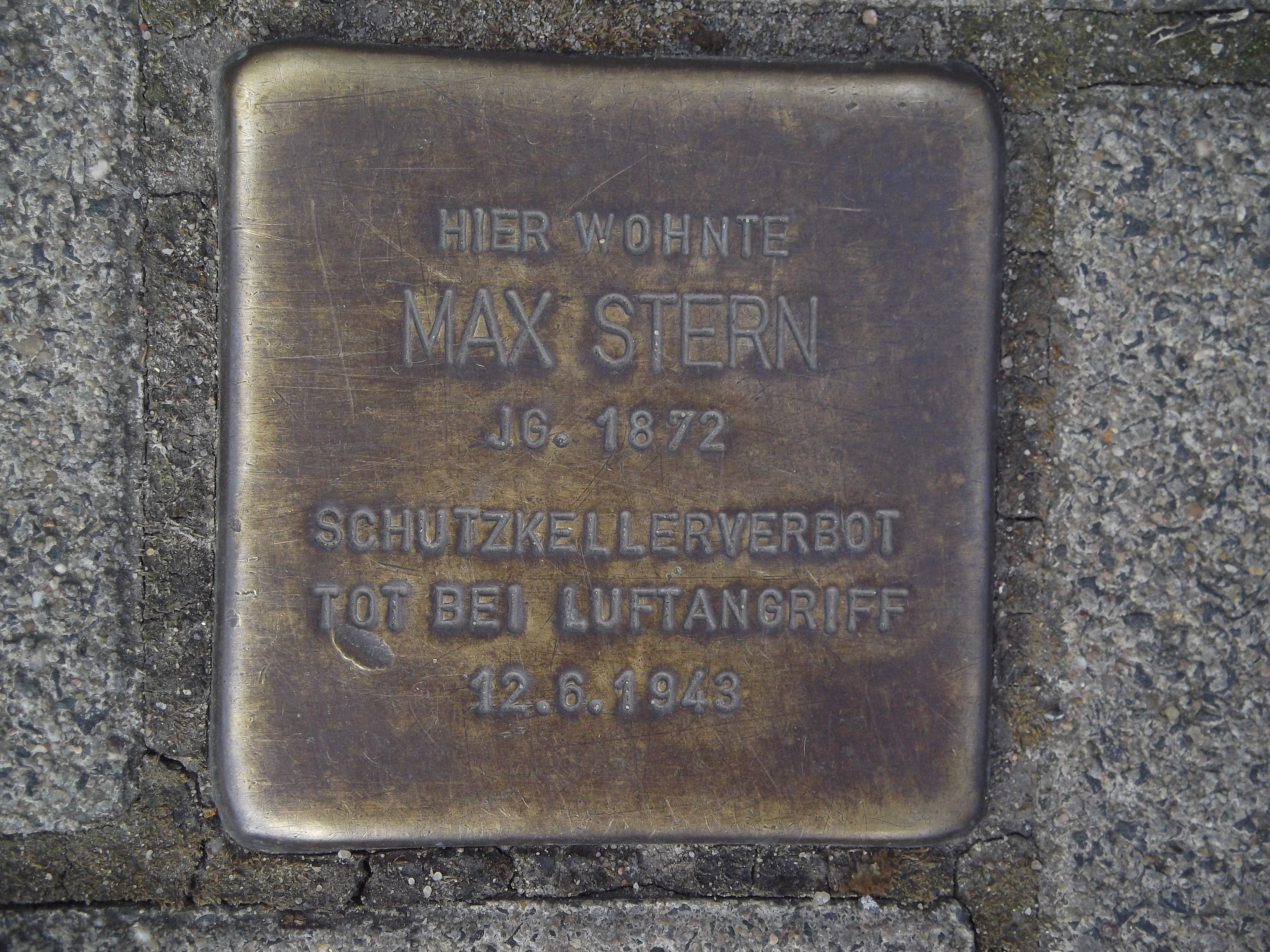 Hier wohnte Max Stern, Jg. 1872, Schutzkellerverbot, tot bei Luftangriff 12.6.1943